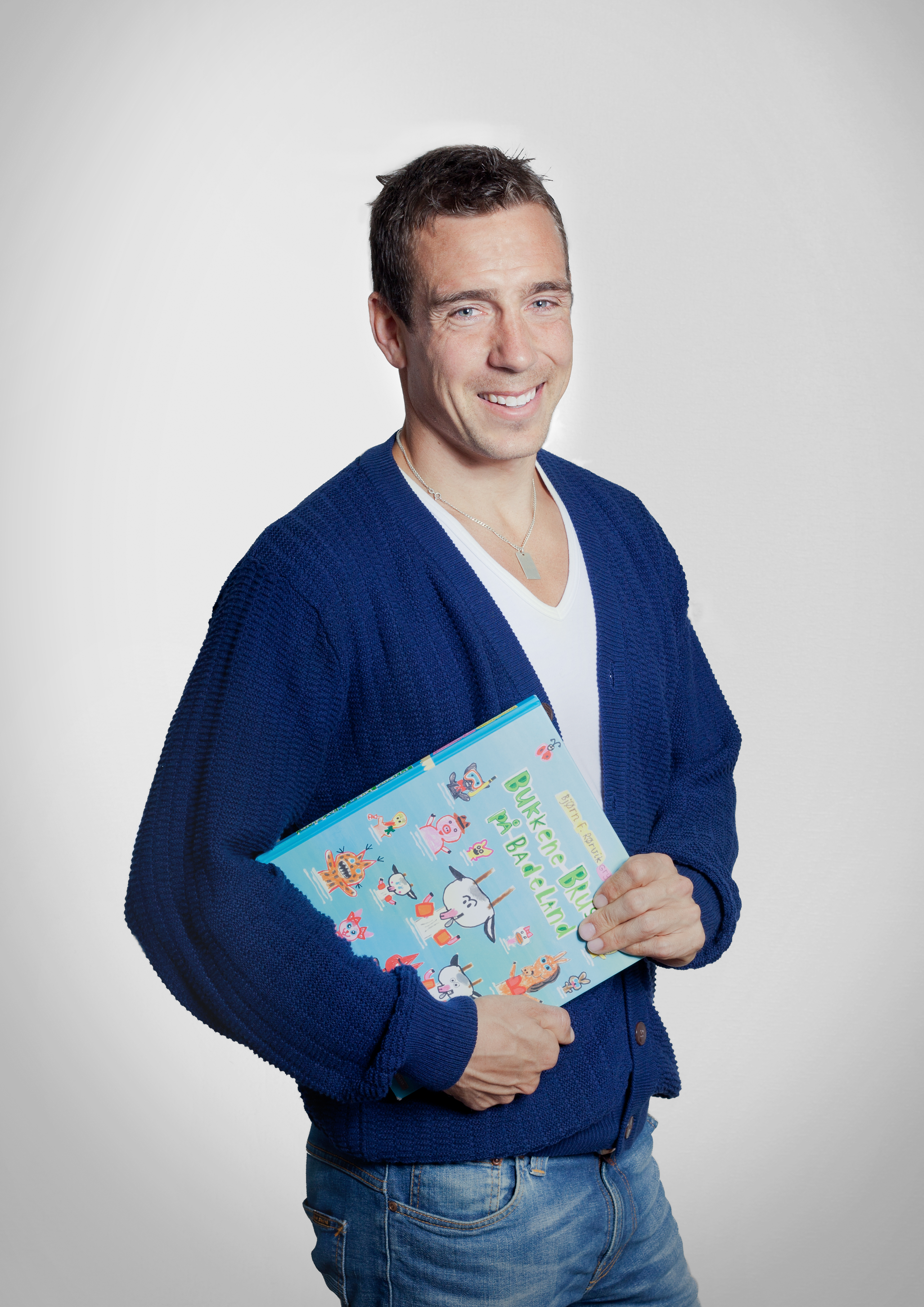 langrennsløperen Eldar Rønning. Bildet er tatt i forbindelse med Nord-Trøndelag fylkesbiblioteks kampanje "Leseambassadører"